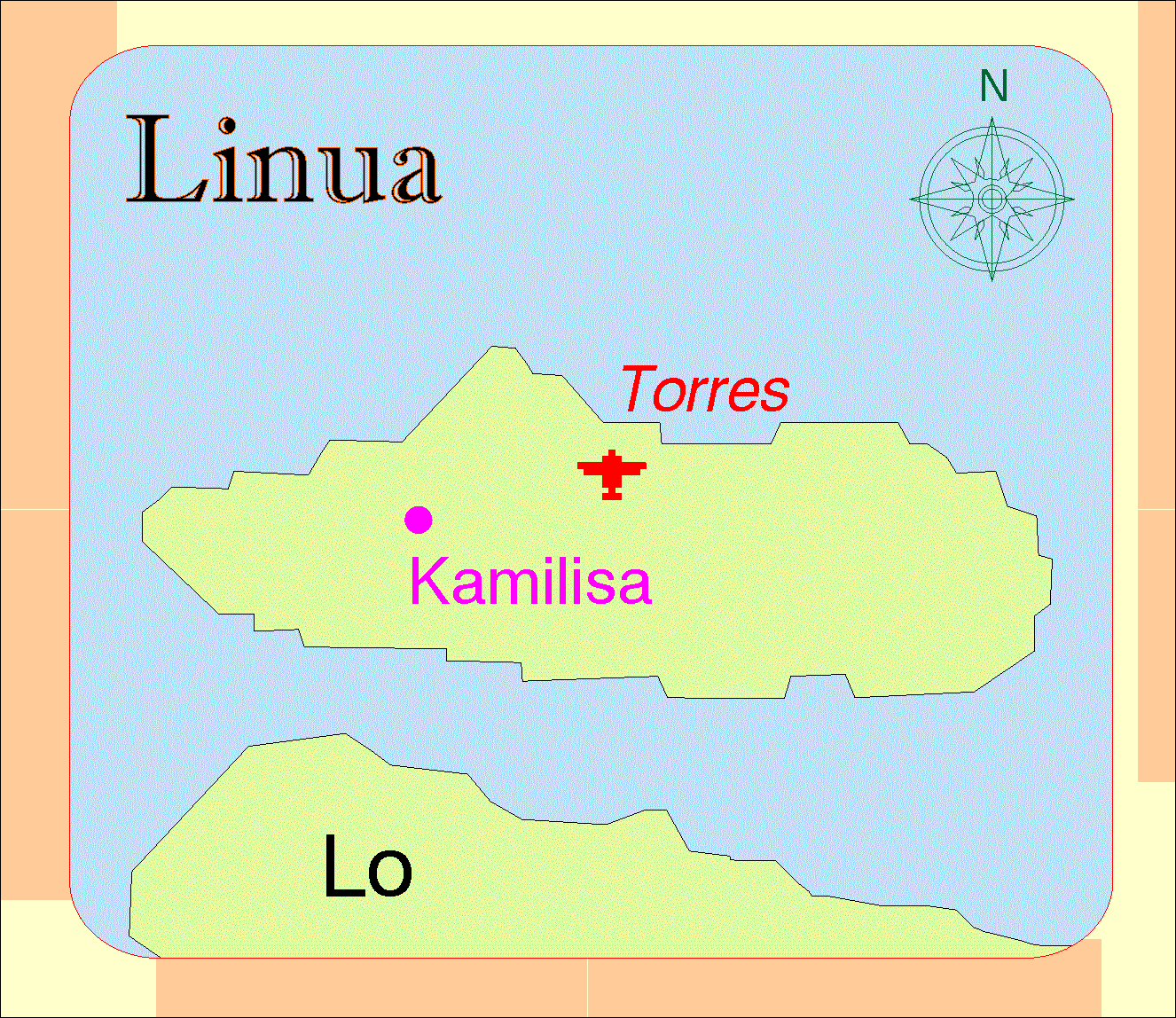 Карта на остров Линуа.